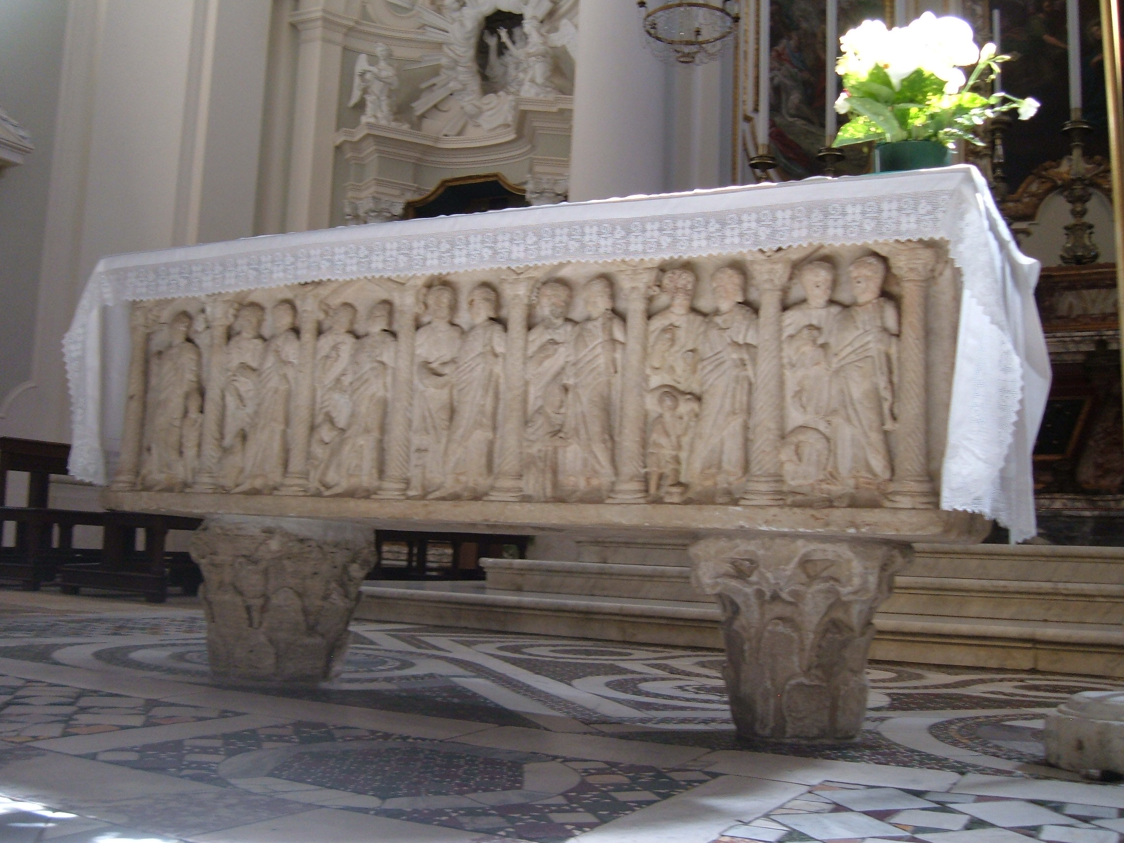 Duomo (Civita Castellana)